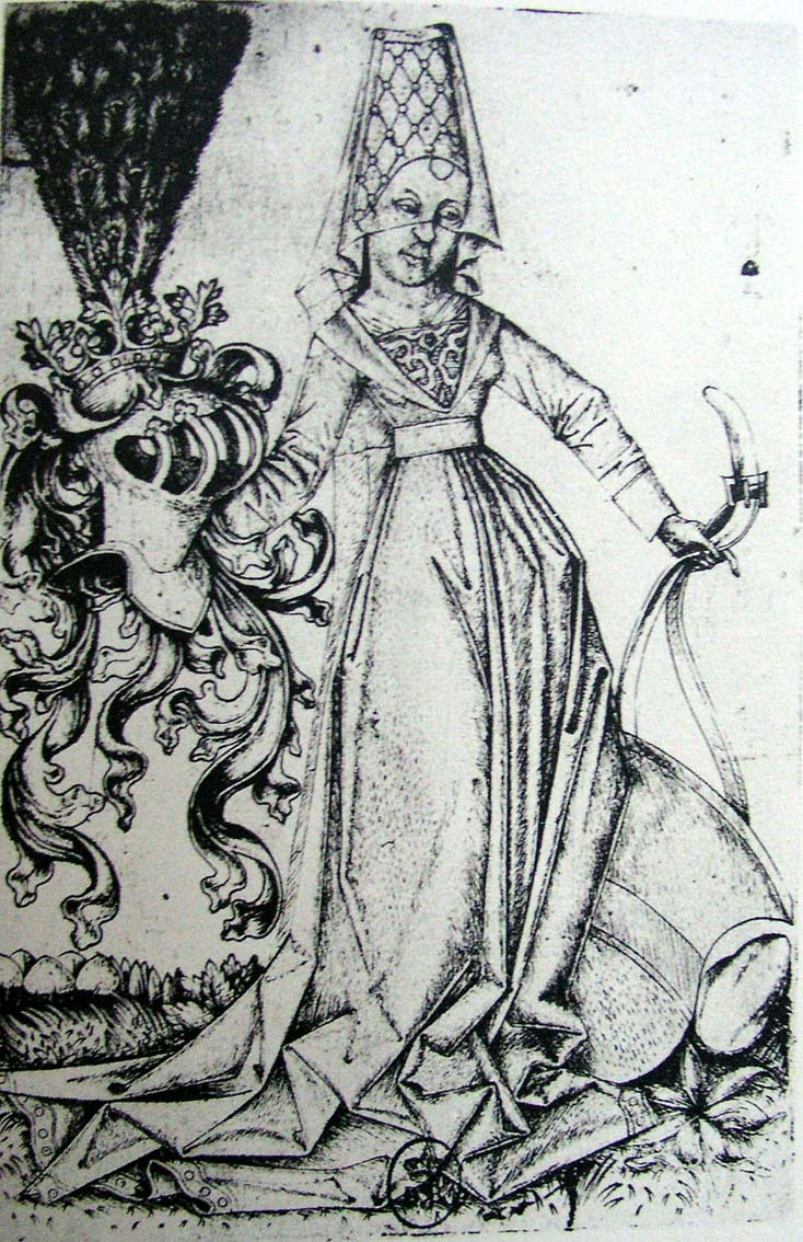 Dame mit Helm und Bindenschild Österreichs, L.223